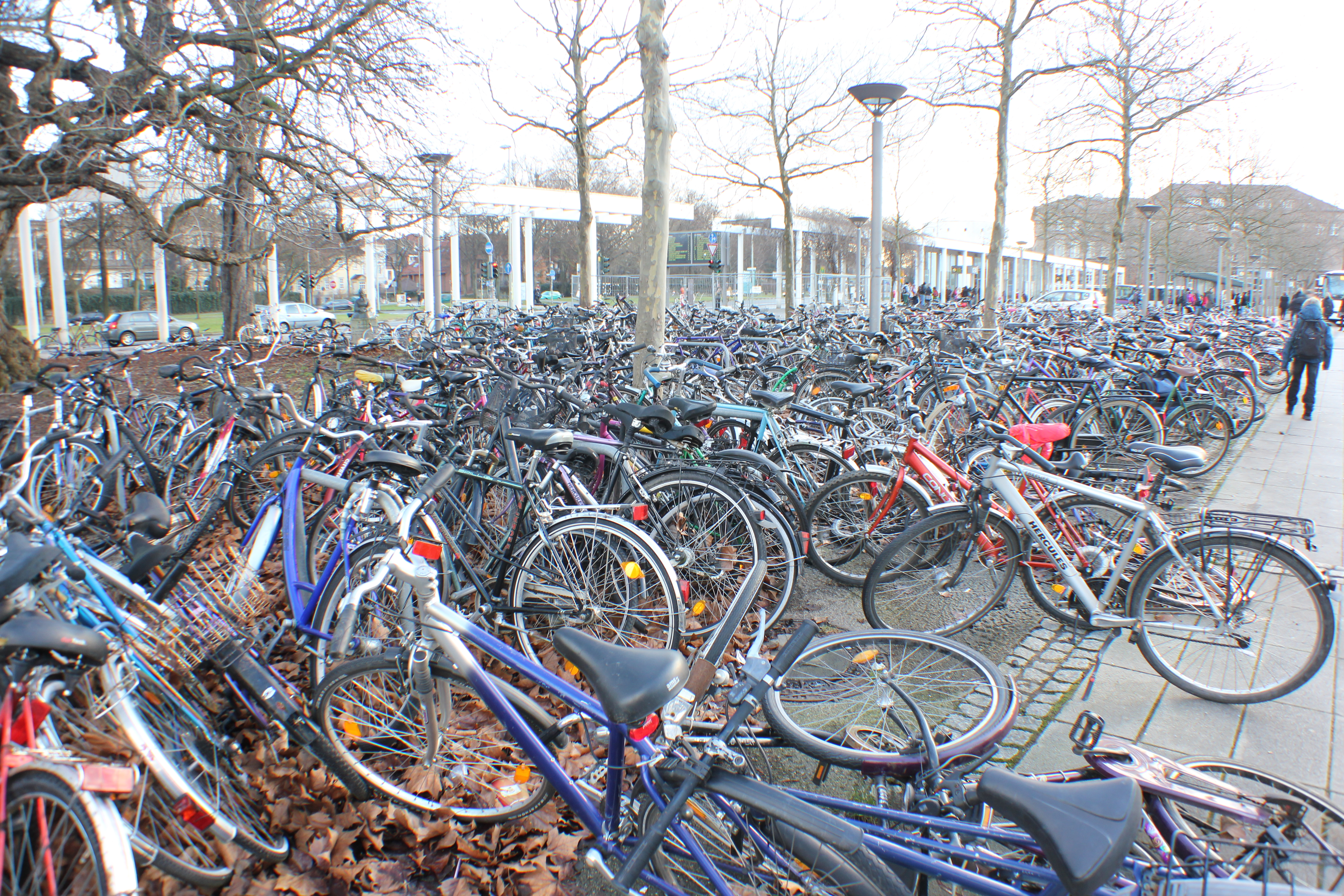 Die Fahrraeder beim Bahnhof Goettingen (Bicycles - Train Station Goettingen)